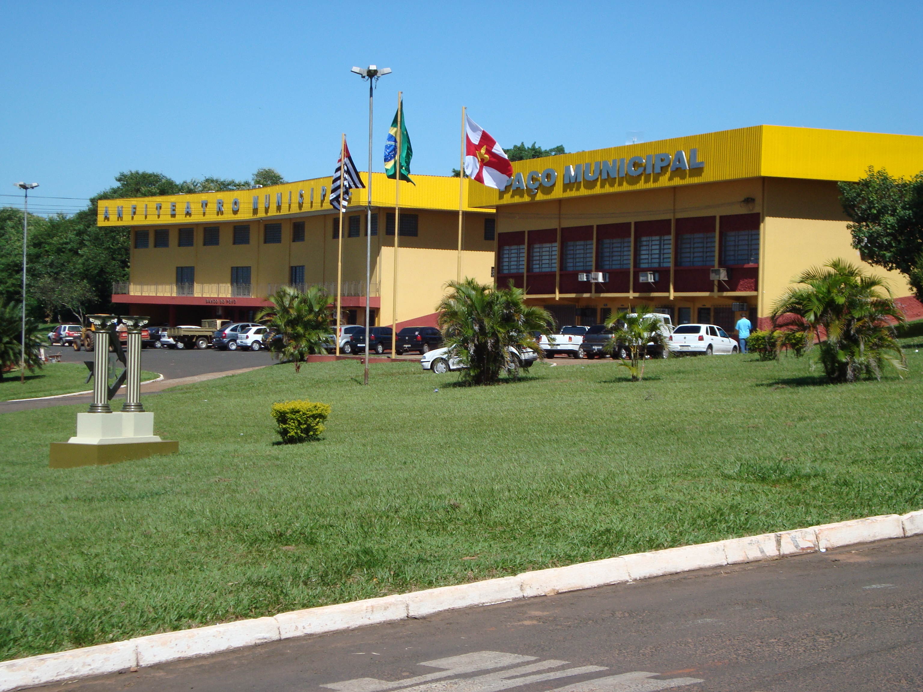 Anfiteatro Municipal e Prefeitura de Regente Feijó